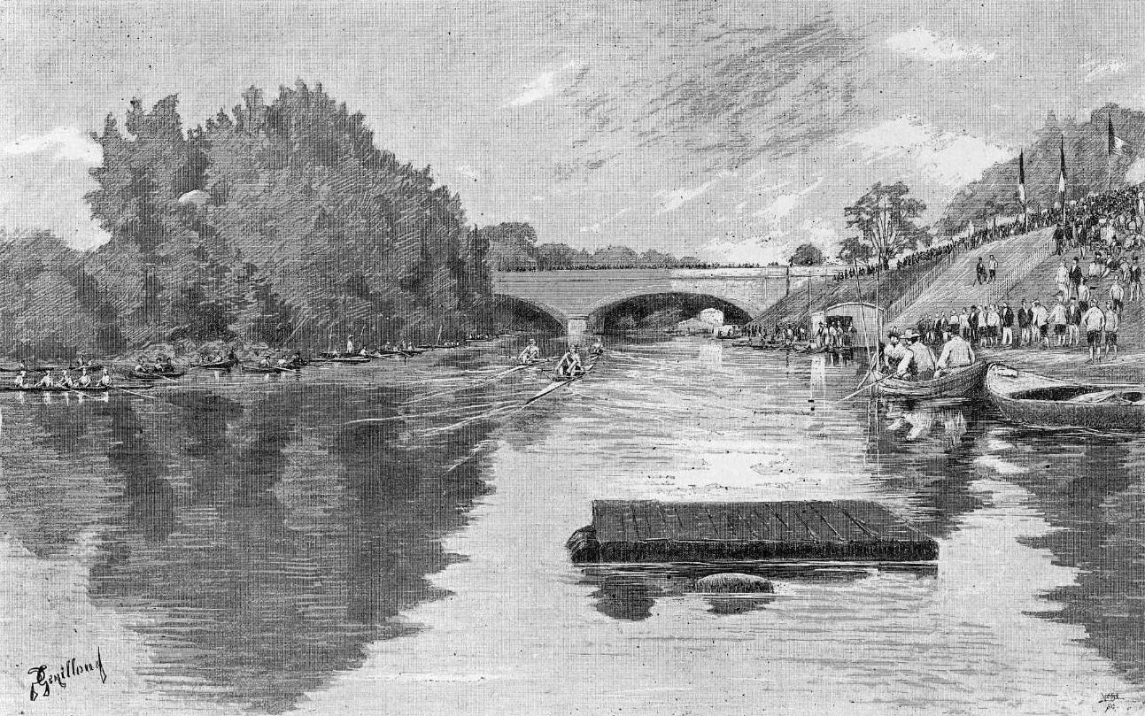 Les championnats d'aviron de la Seine en 1892. Les plus anciens championnats français. Palmarès: 1853 à 1856 Frédéric Lowe, 1857 à 1861 Louis Armet, 1862 Eugène Gamby, 1863 Louis Huot, 1864 à 1867 Eugène Frébault... ...1892 Émile Lepron.